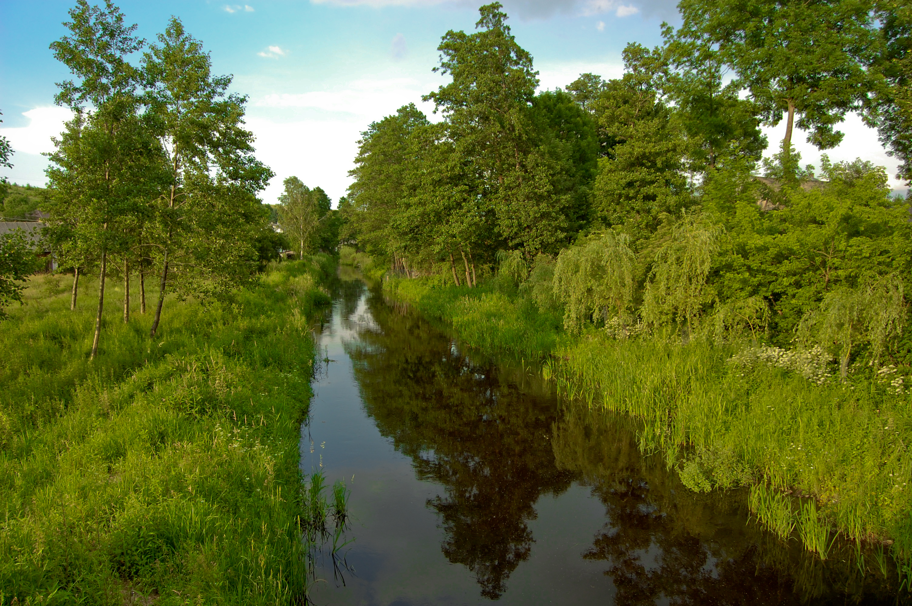 Krasnobród, rzeka Wieprz